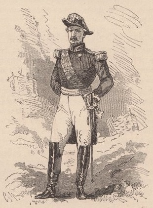 Le général Robels, commandant de l'armée paraguayenne du Sud.